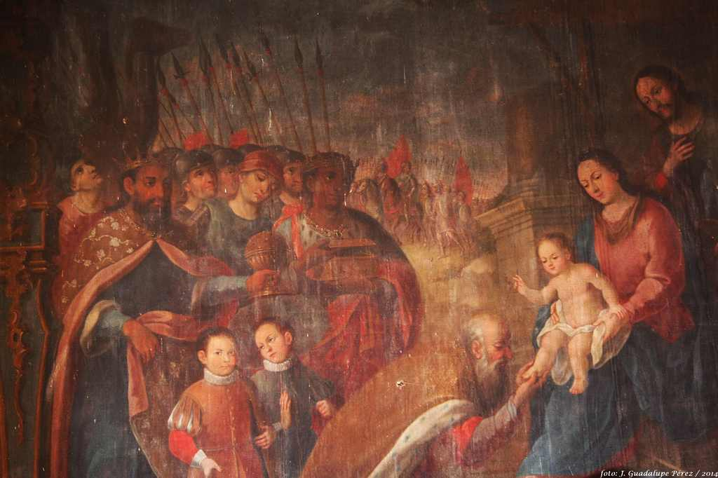 Totolac, Tlaxcala Foto: J. Guadalupe Pérez /2014